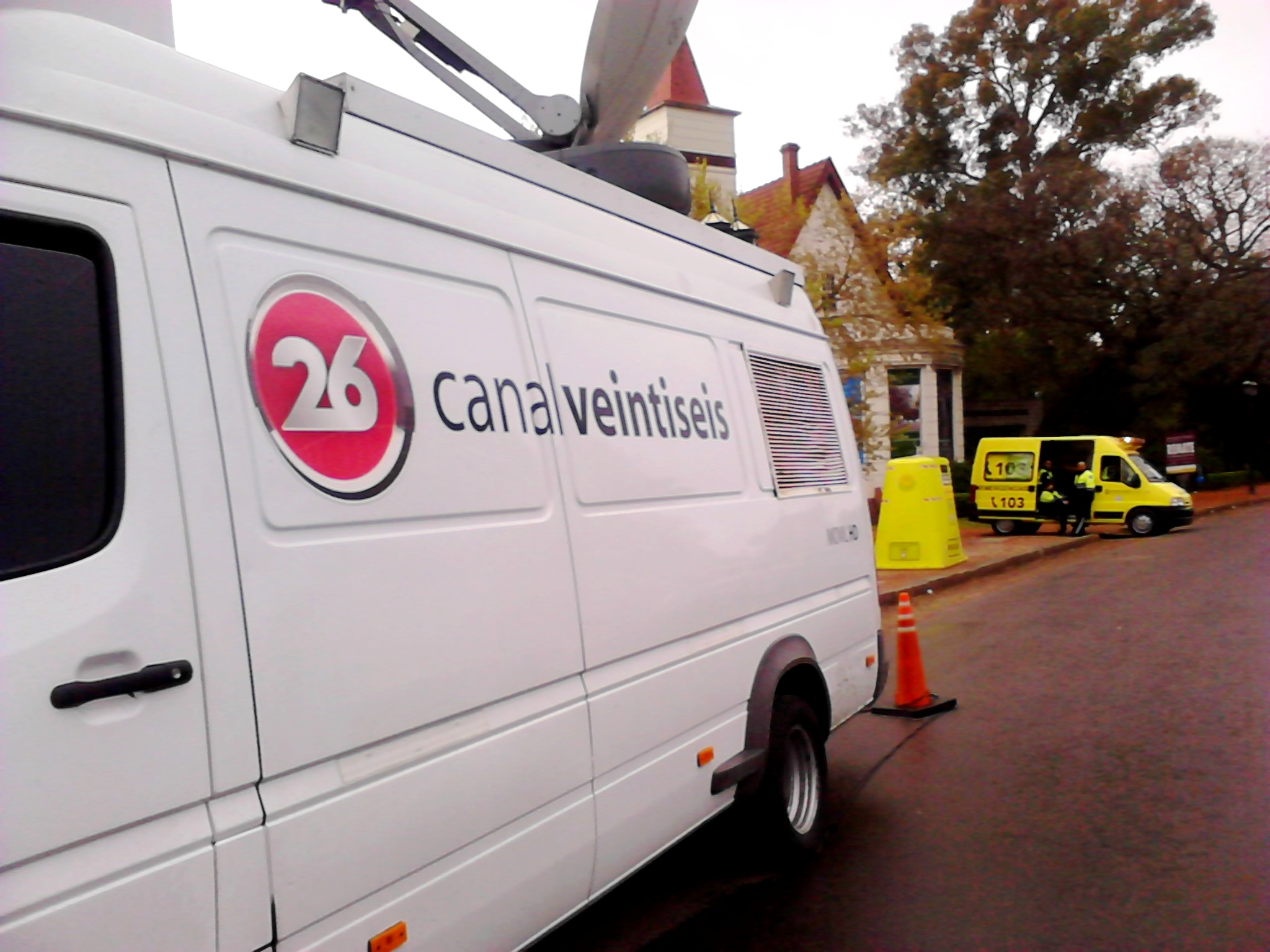 Móvil del Canal 26 estacionado en el Rosedal de Palermo, Buenos Aires, Argentina.